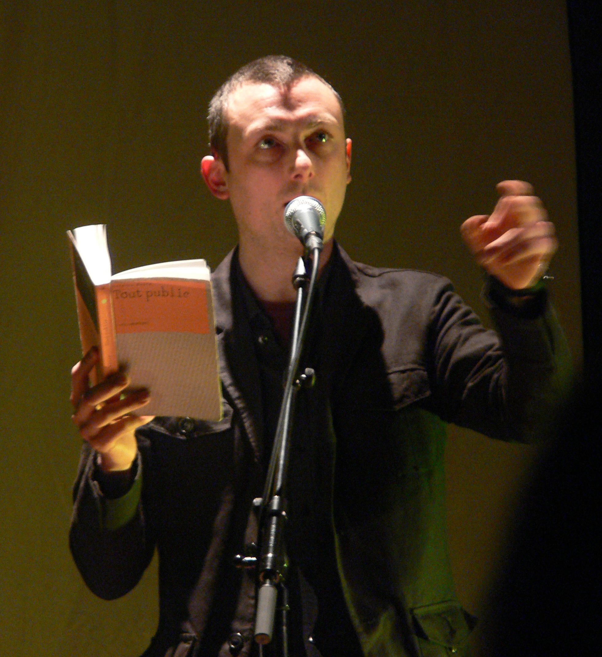 Lecture d'Antoine Boutte lors d'une carte blanche donnée à François Bon, artiste en résidence de l'université de Louvain-la-Neuve. Ferme du Biéreau, 1er mars 2012.